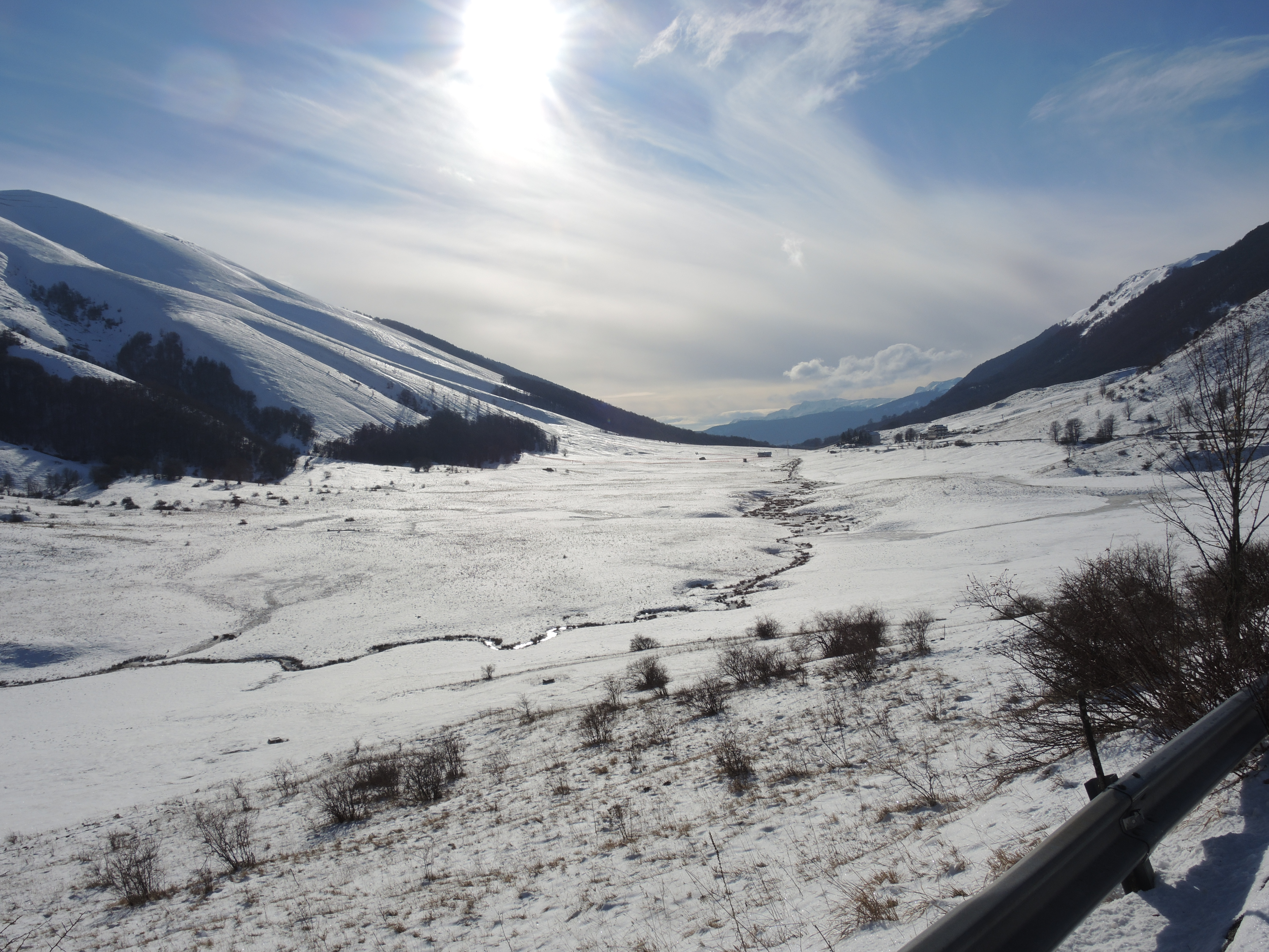 Passo Godi